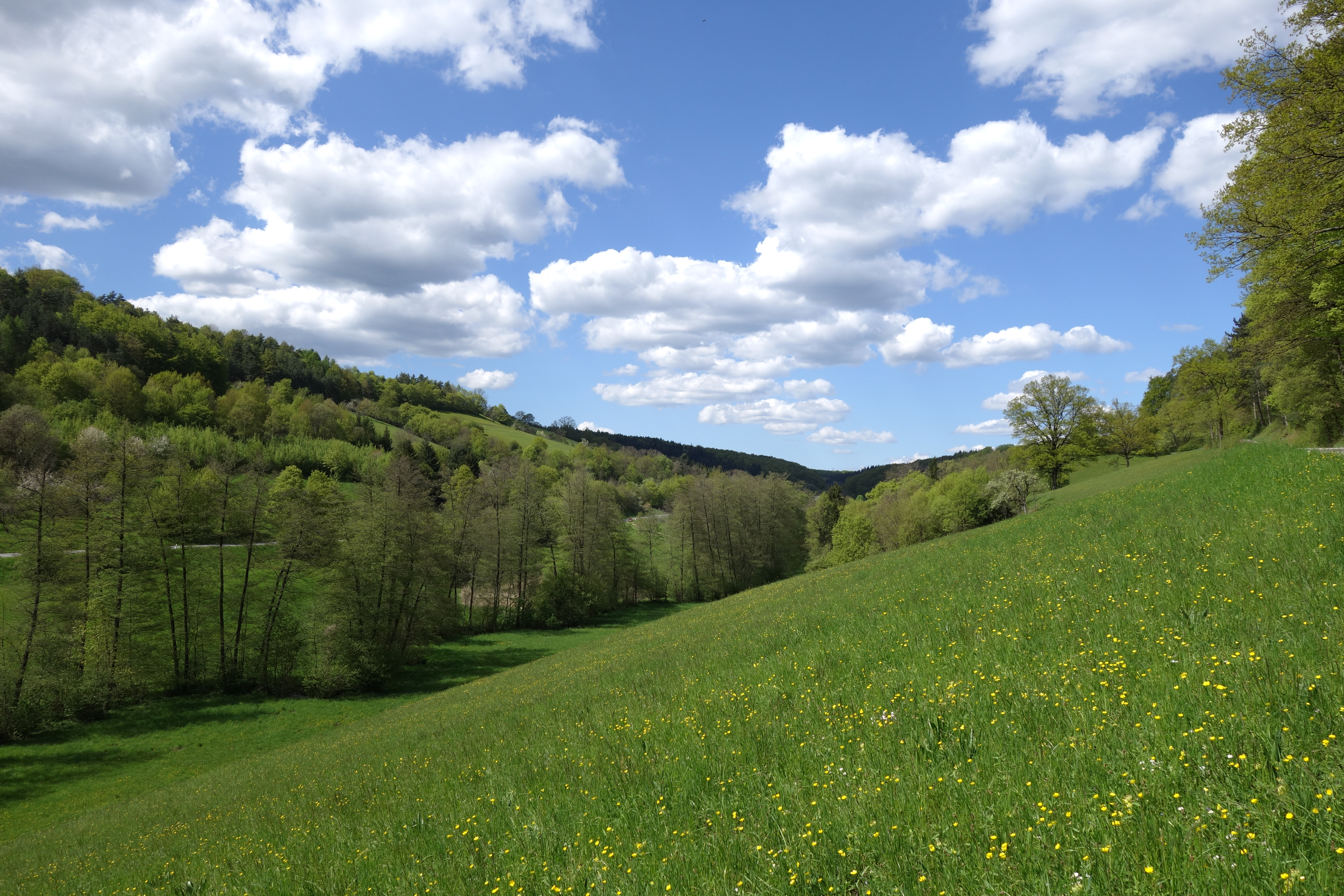 Tal des Nüstenbachs bei Mosbach-Neckarelz